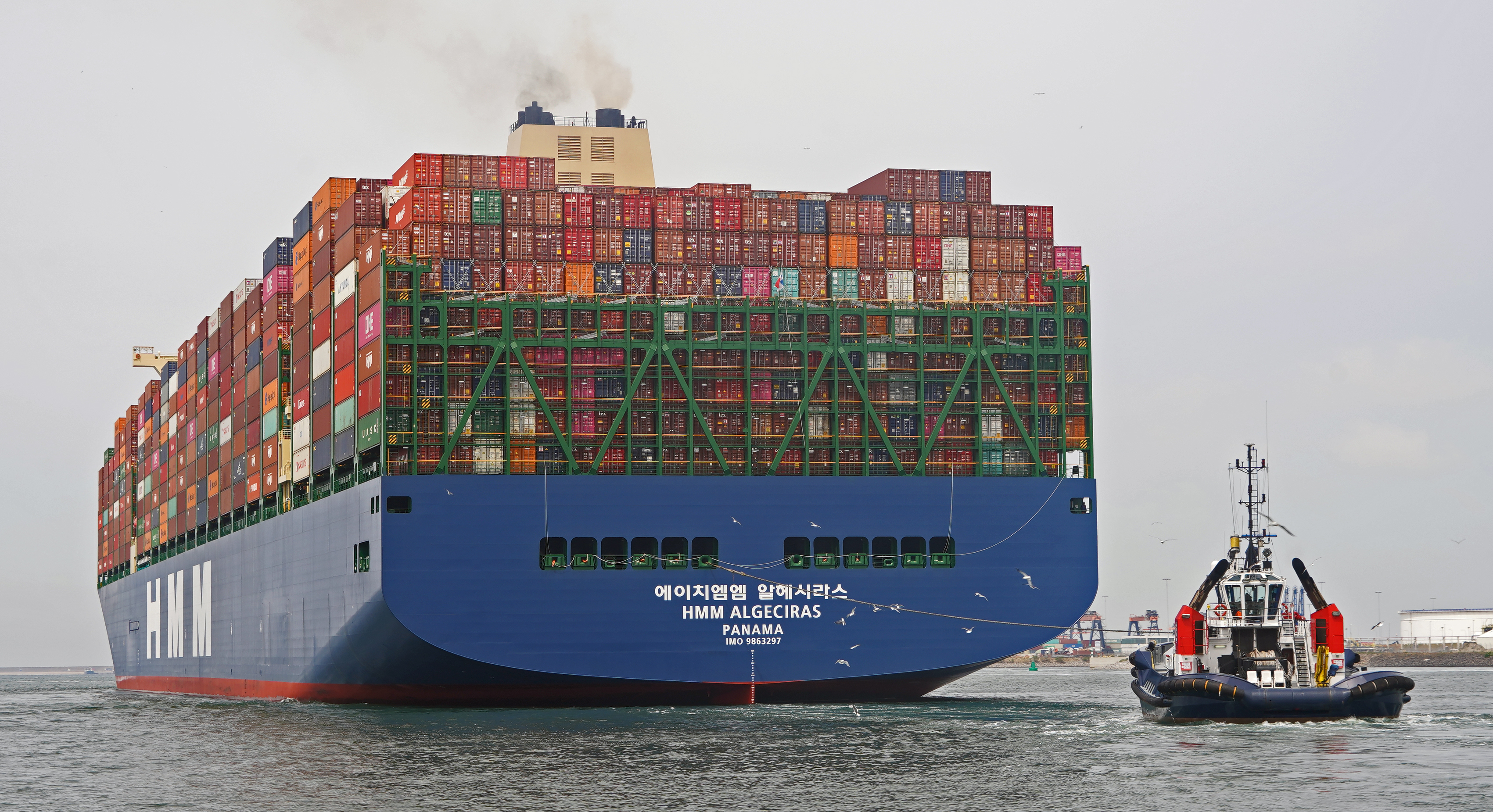 3-6-2020 eerste bezoek aan Rotterdam van het grootste containerschip ter wereld , VB CHEETAH en Rotterdam van Boluda Towage assisteerden het schip naar de RWG terminal op de Maasvlakte 2